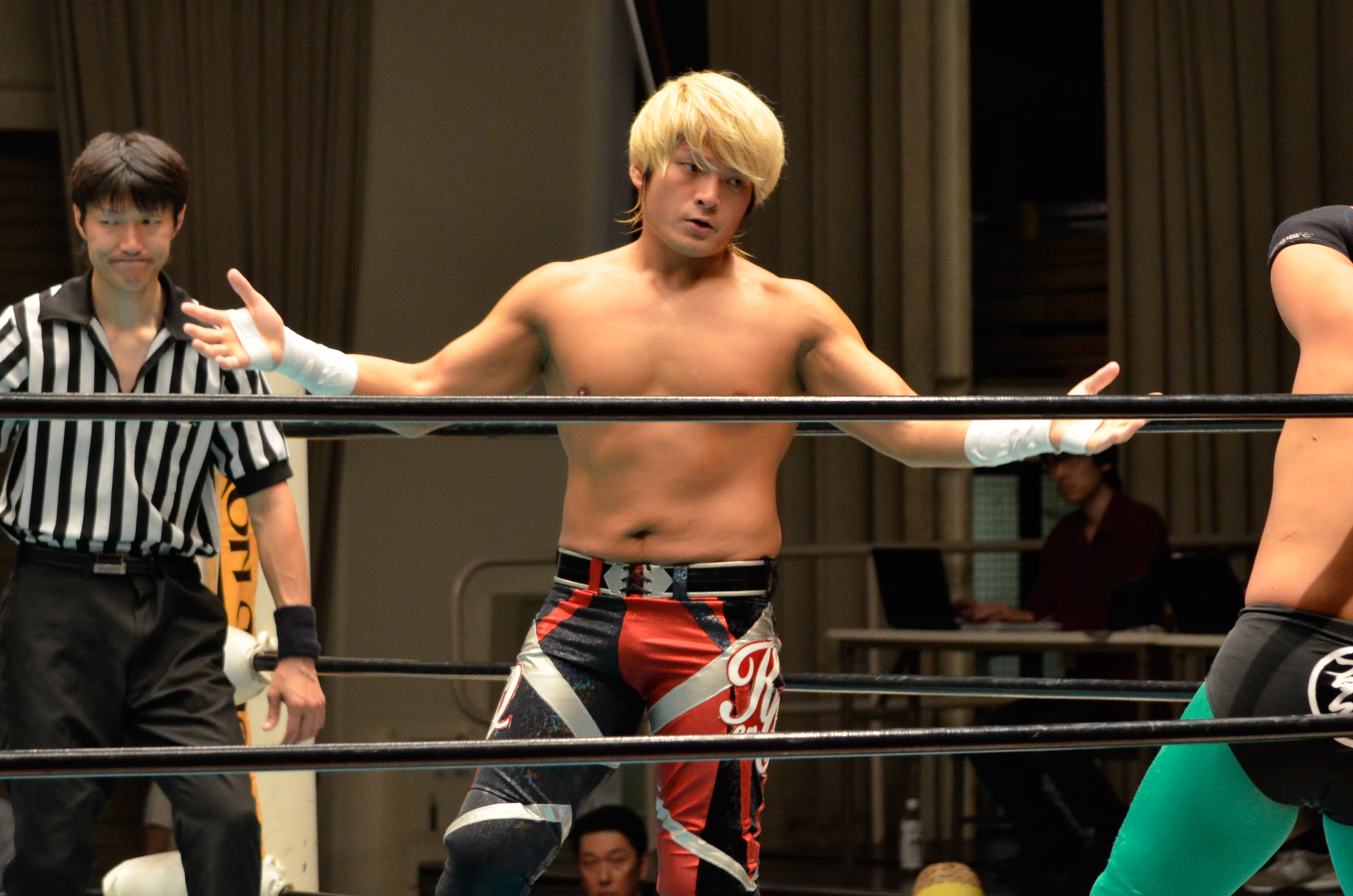 拳王（プロレスラー）